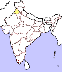 Kartan bygger på resultatet från valet till Lok Sabha april/maj 2004. Gult betyder att partiet lanserat en eller flera kandidater i delstaten, dock utan att vinna mandat. Orange betyder att partiet vunnit mandat från delstaten. Rött betyder att partiet vunnit minst 25% av mandaten från den delstaten och mörkrött 50% eller mer. Kartan tar inte hänsyn till avhopp, partifusioner och fyllnadsval under den ordinarie mandatperiodens gång. Gjord av Soman.